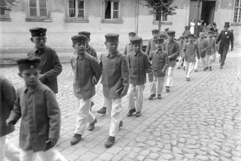 Ein Sonntagmorgen im Grossen Potsdamer Waisenhaus, (ehemal. Militär-Waisenhaus). Die kleinen Waisenkinder des Potsdamer Grossen Waisenhauses in ihrem Sonntagsstaat auf dem Kirchgang.